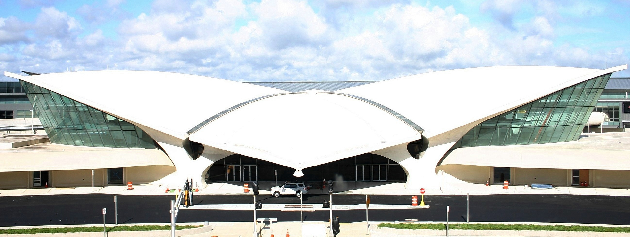 Ehemaliges TWA-Terminal am John F. Kennedy International Airport in New York, from parking garage roof